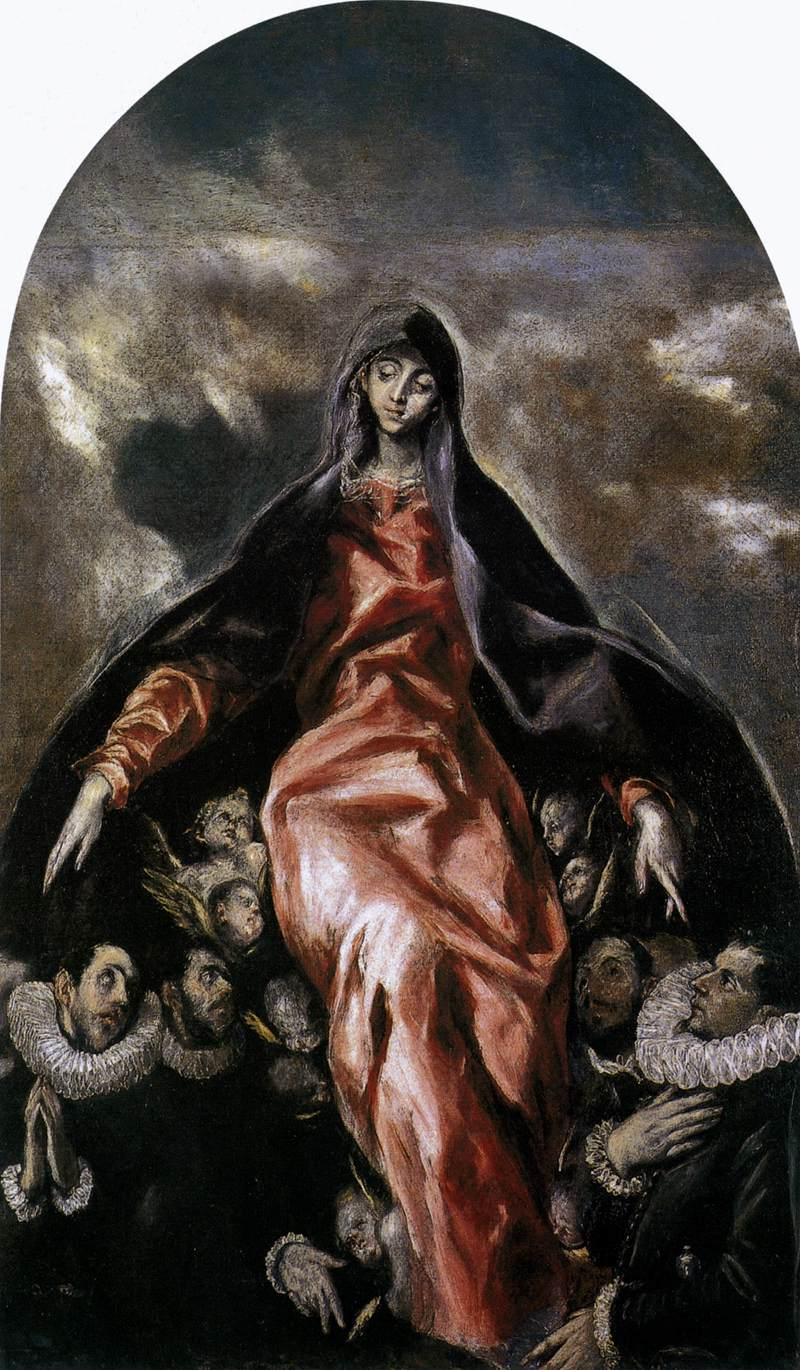 La obra, titulada la Virgen de la Caridad, representa a la Virgen María junto a un grupo de fieles.